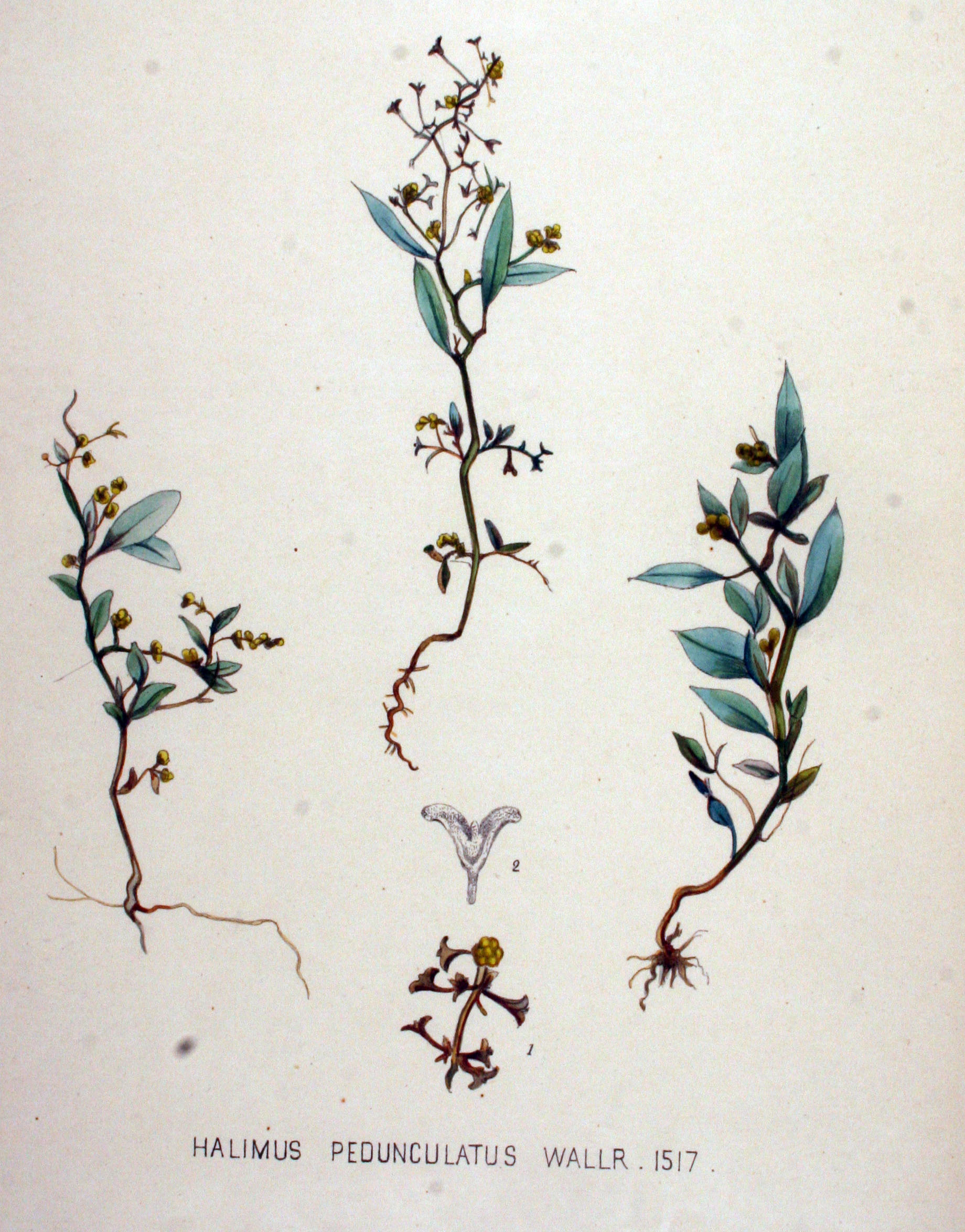 Halimione pedunculata (L.) Aell. (Syn. Halimus pedunculatus (L.) Wallr.)